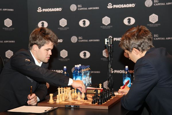 Карлсен - Карякин, 5 партия